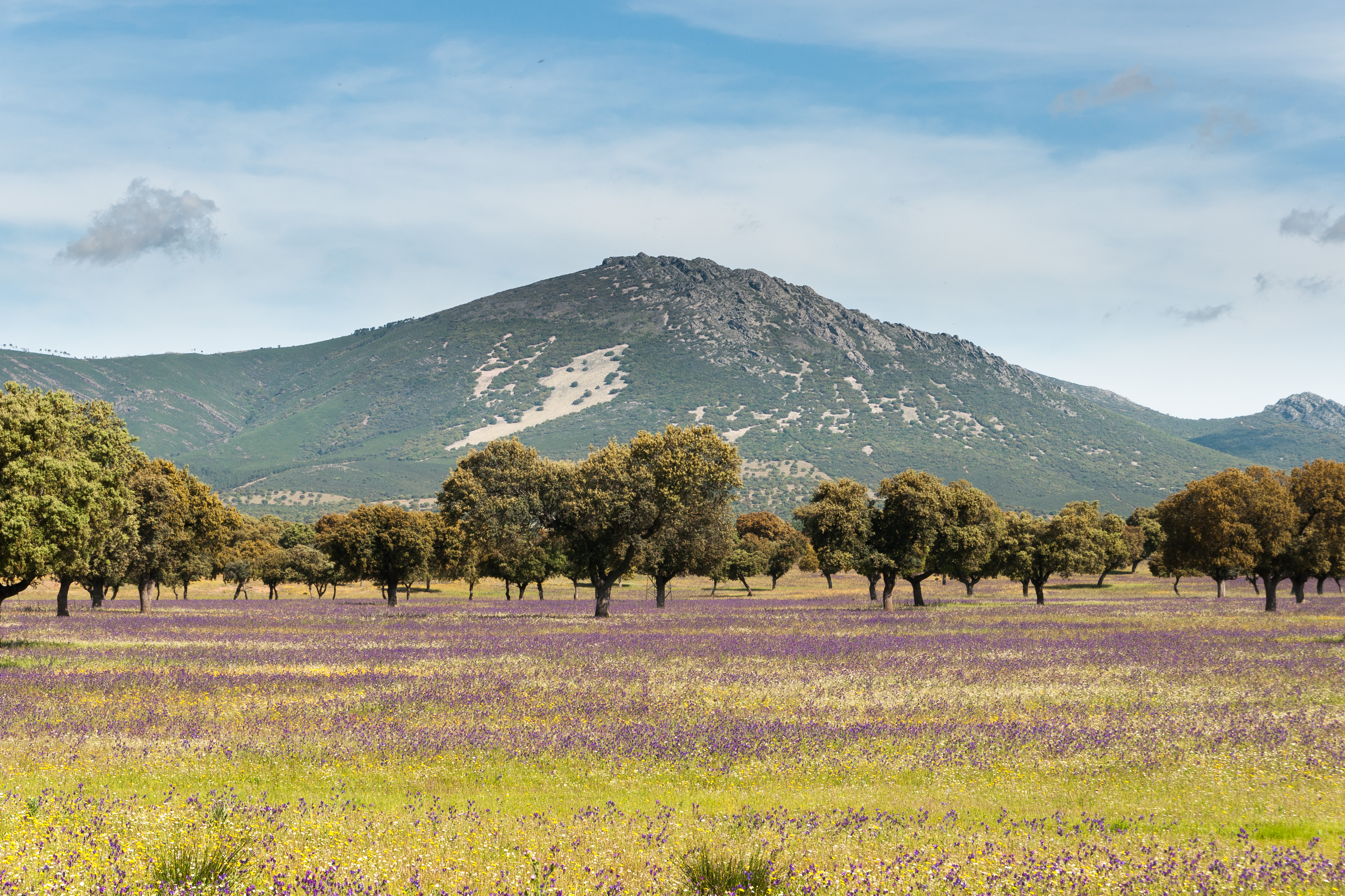 Montes de Toledo, en Retuerta del Bullaque (provincia de Ciudad Real). This is a photography of a Special Area of Conservation in Spain with the ID: ES4250005. Natura2000 entry, EEA entry